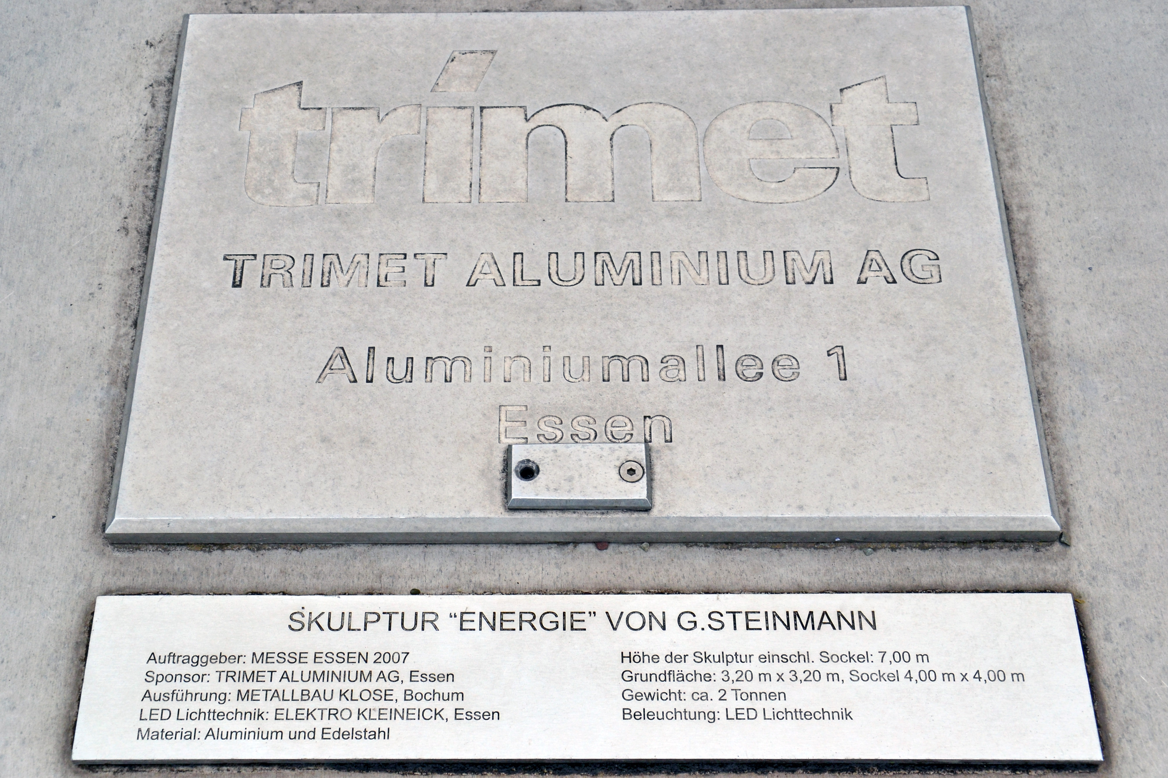 Tafel an der Skulptur Energie vor dem Messehaus Ost der Messe Essen